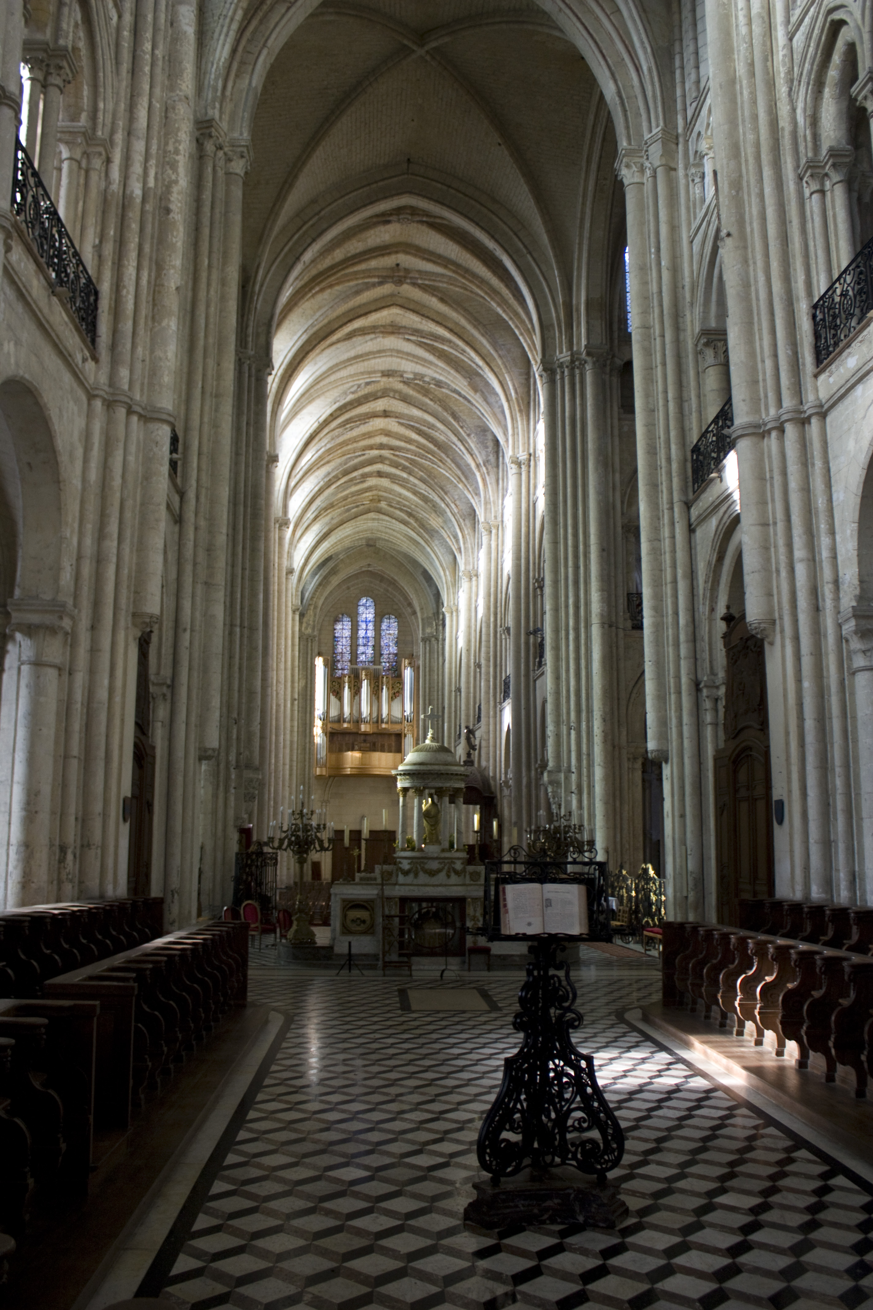 La nef vue du déambulatoire.